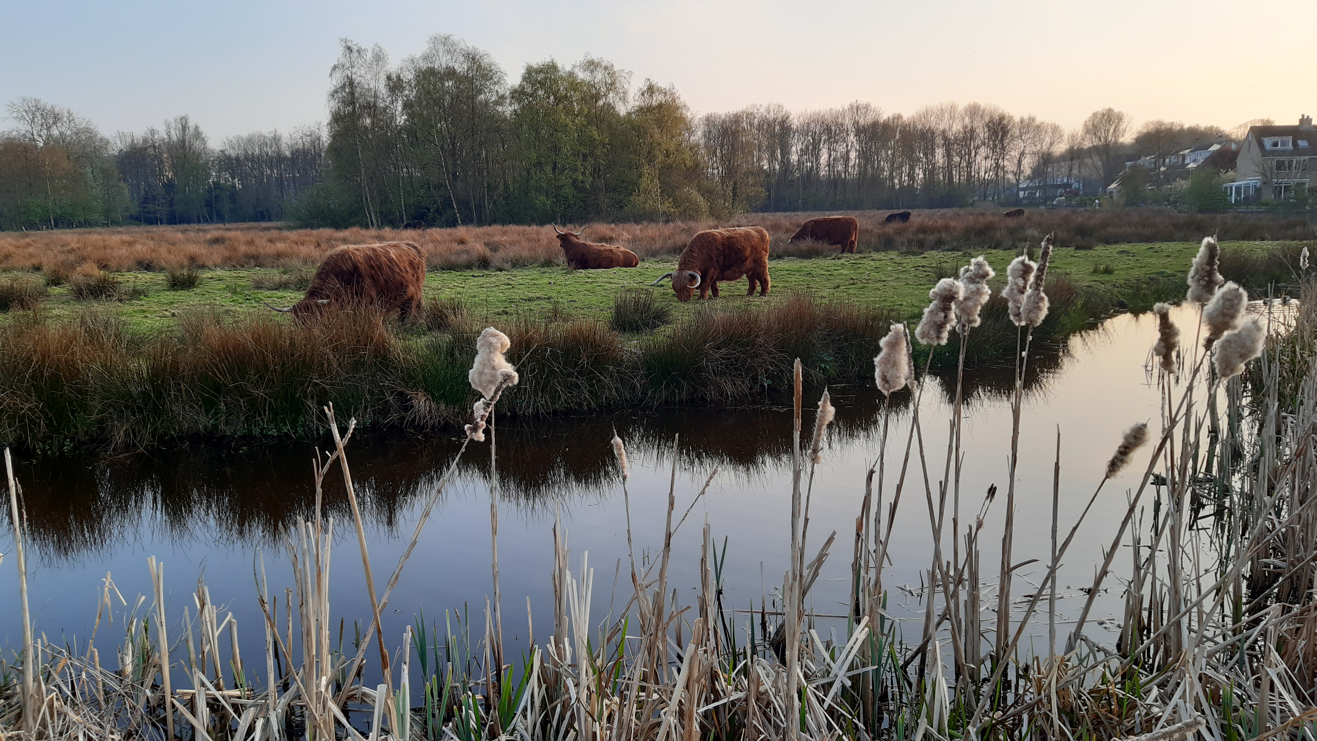 Libellebos, een klein bosje in Uithoorn, met een aantal runderen